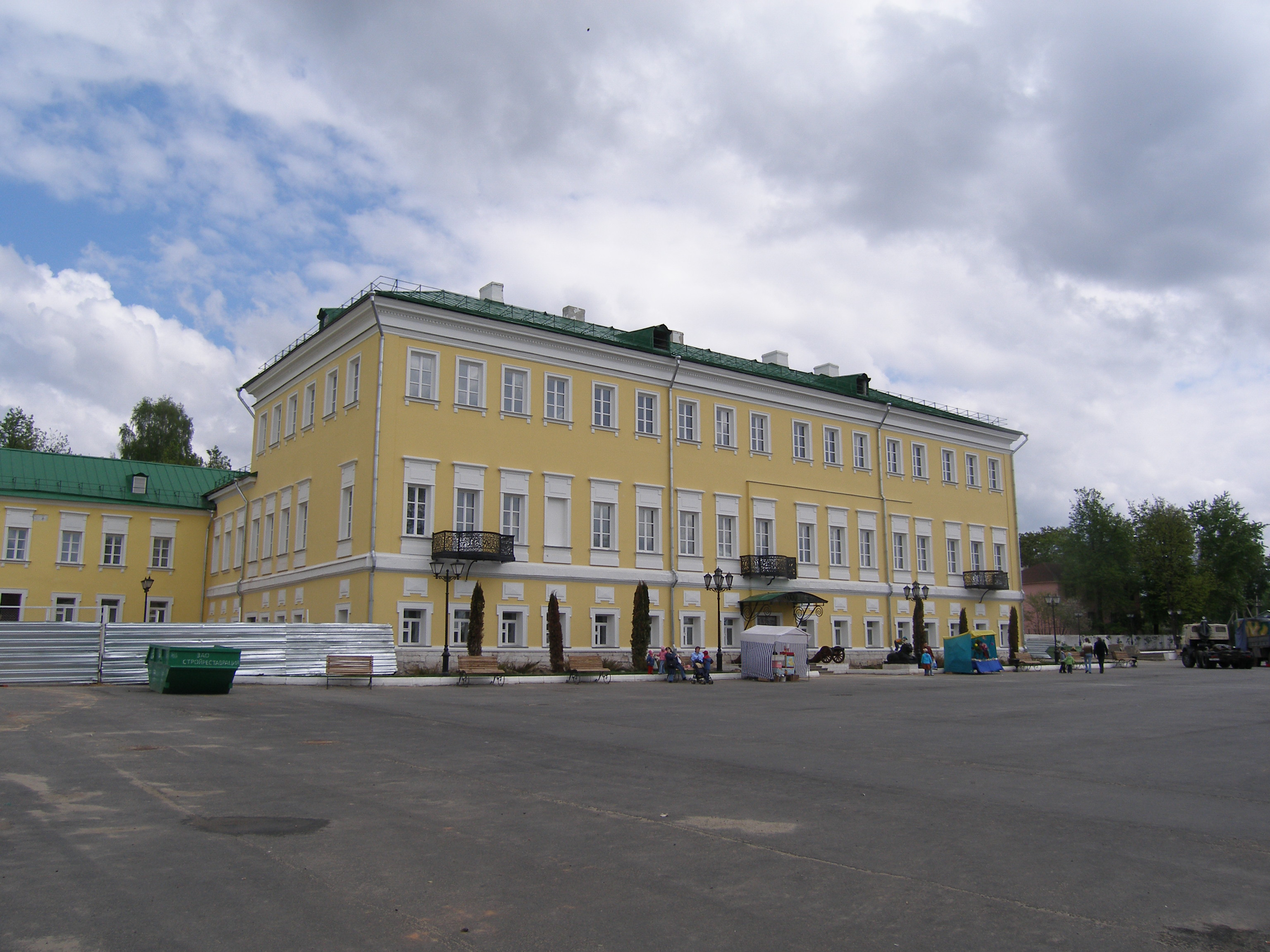 Дом Баташева в Выксе